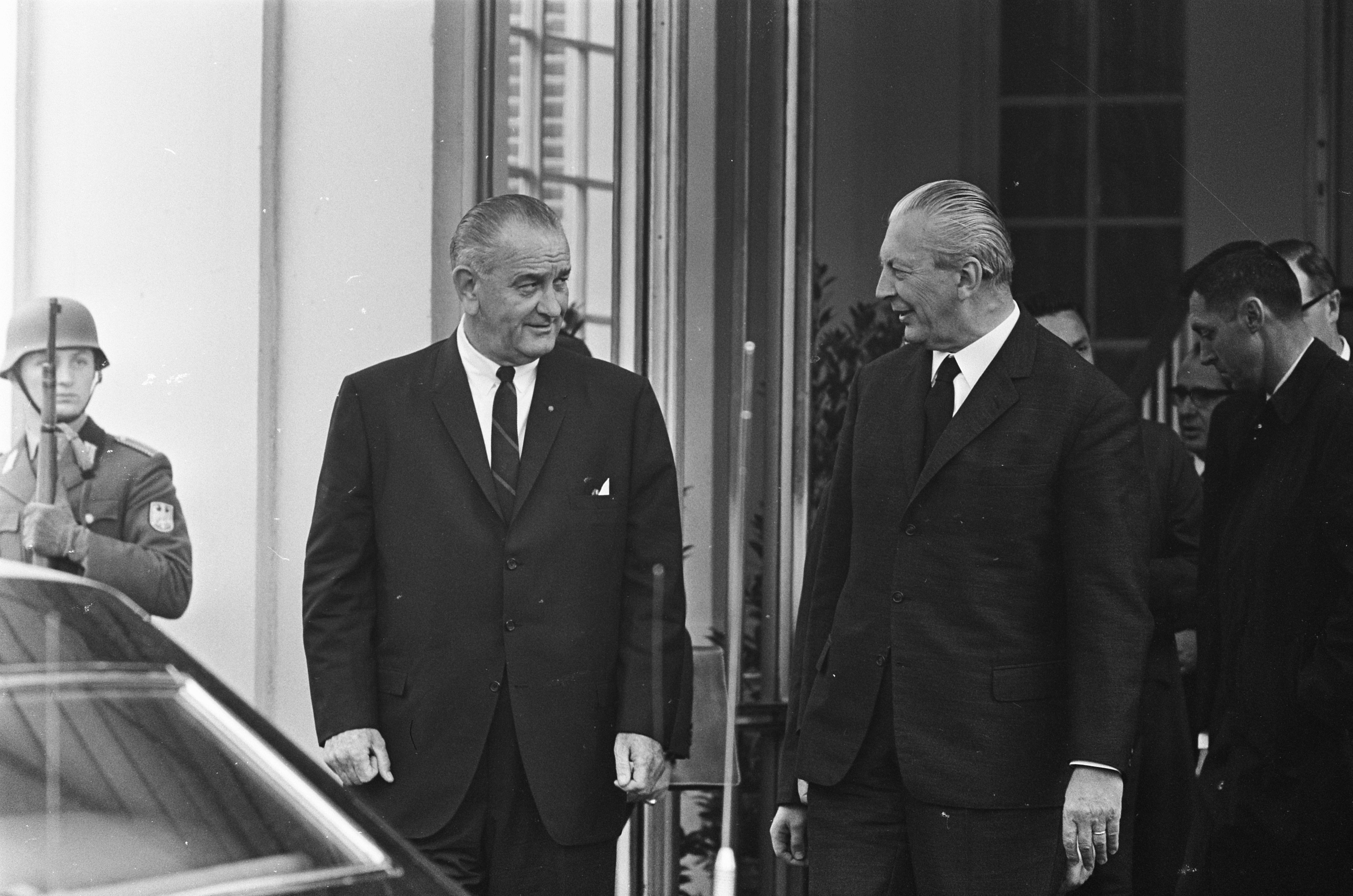 Collectie / Archief : Fotocollectie Anefo Reportage / Serie : [ onbekend ] Beschrijving : President Johnson (USA) had besprekingen met Kiesinger te Bonn, Johnson en Kiesinger Datum : 24 april 1967 Locatie : Amerika, Bonn Trefwoorden : besprekingen Persoonsnaam : Johnson, Lyndon B., Kiesinger Fotograaf : Merk, Ben / Anefo Auteursrechthebbende : Nationaal Archief Materiaalsoort : Negatief (zwart/wit) Nummer archiefinventaris : bekijk toegang 2.24.01.05 Bestanddeelnummer : 920-2595